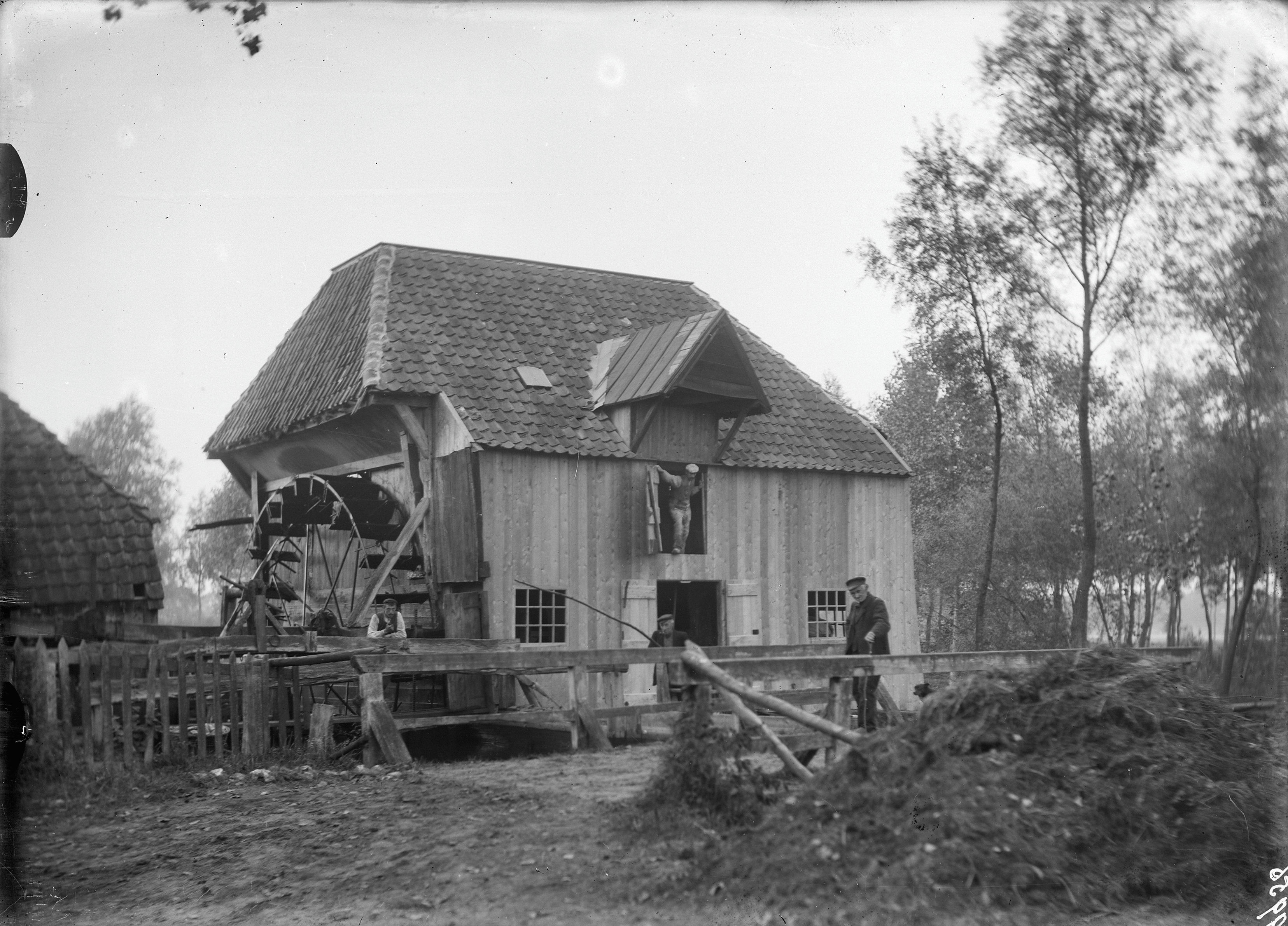 Watermolen, volmolen